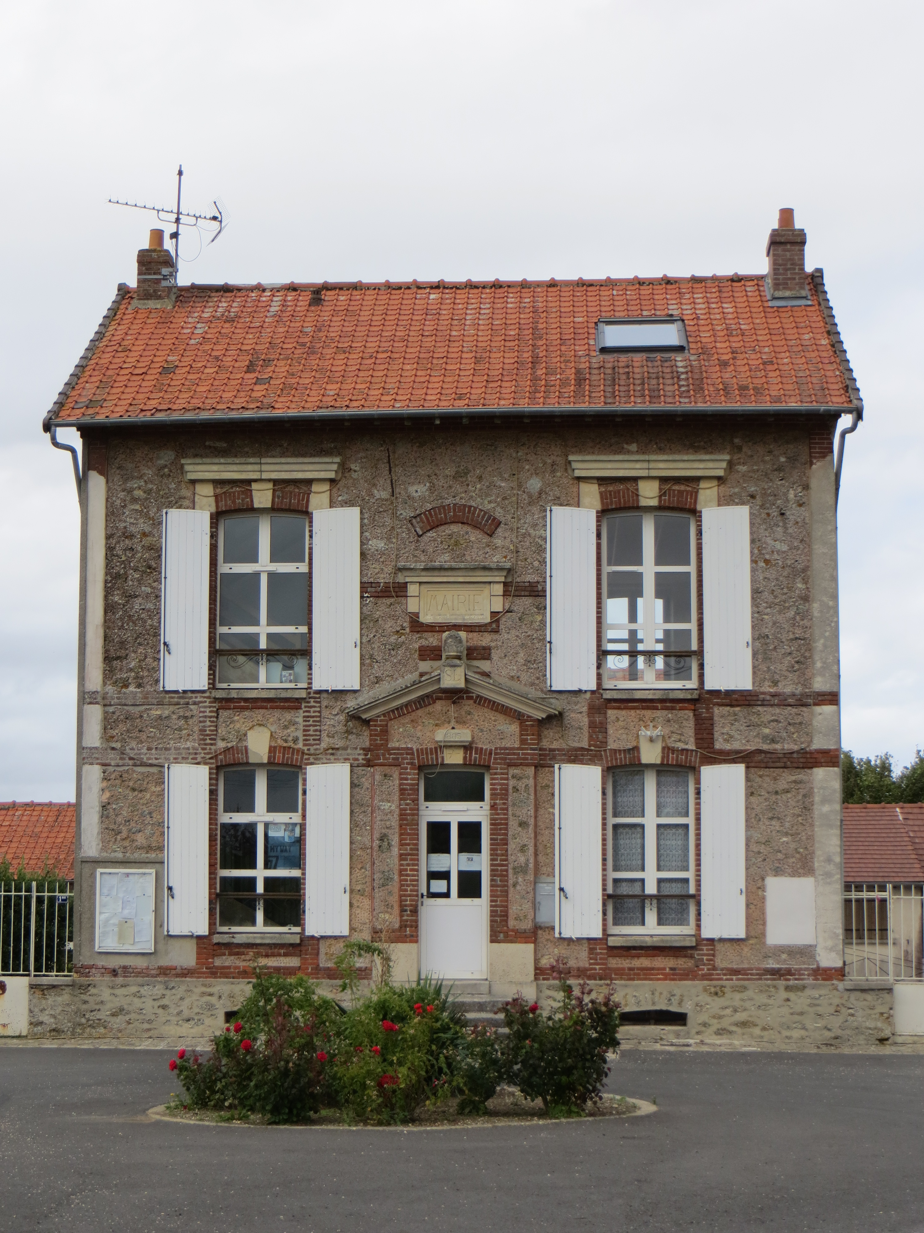 Mairie